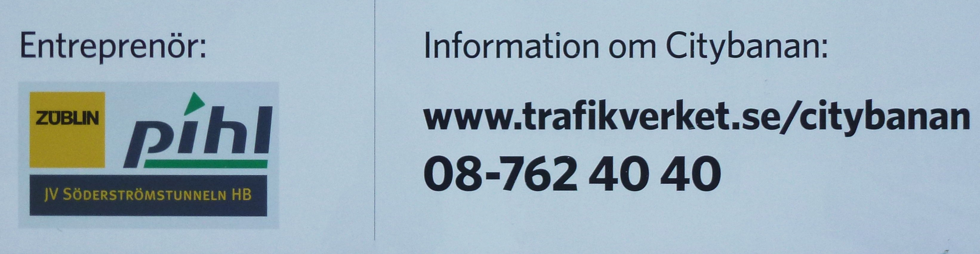 Züblins och Pihls skylt vid Citybanan